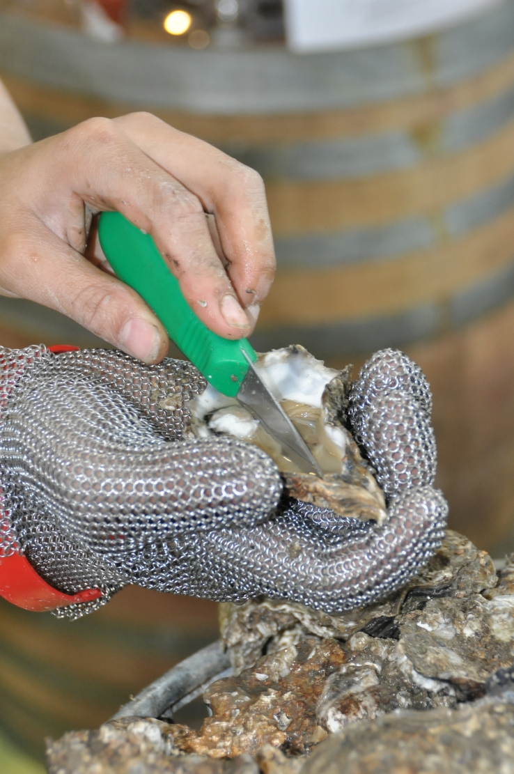 Messe_Slow_Food_2012 in Stuttgart Dieses Foto entstand durch Unterstützung des gemeinnützigen Vereins Skillshare.eu Skillshare e.V. ist ein eingetragener gemeinnütziger Verein zur Förderung der Bildung durch Unterstützung der Erstellung, Sammlung und Verbreitung so genannten freien Wissens. IBAN: DE16 8306 5408 0004 8850 66 BIC: GENODEF1SLR Bank: VR-Bank Altenburger Land